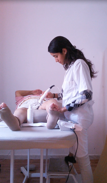 kinésithérapie : l'art de guérir This is an image of "African people at work" from Tunisia